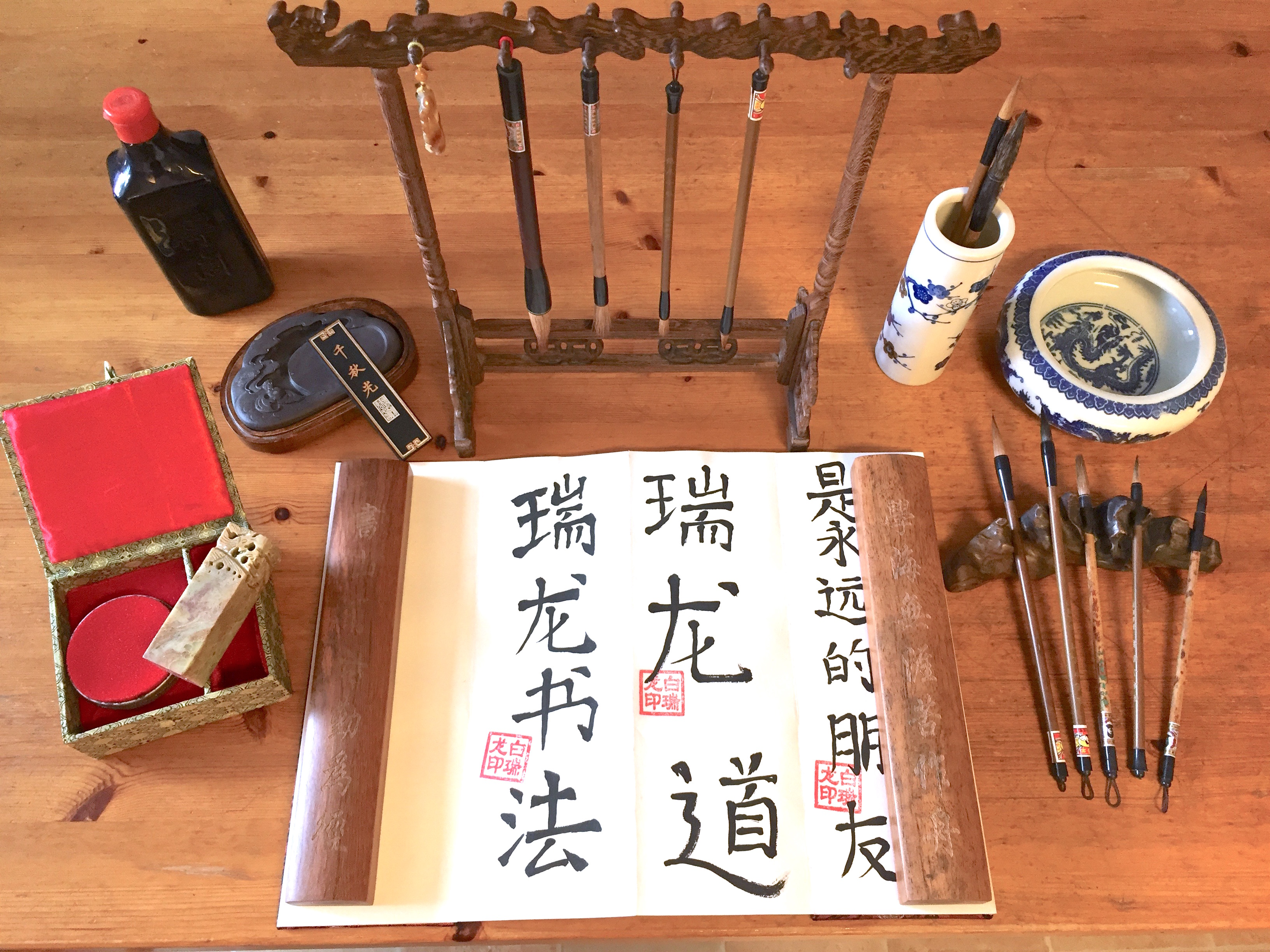 Utrustning som används för kinesisk kalligrafi.